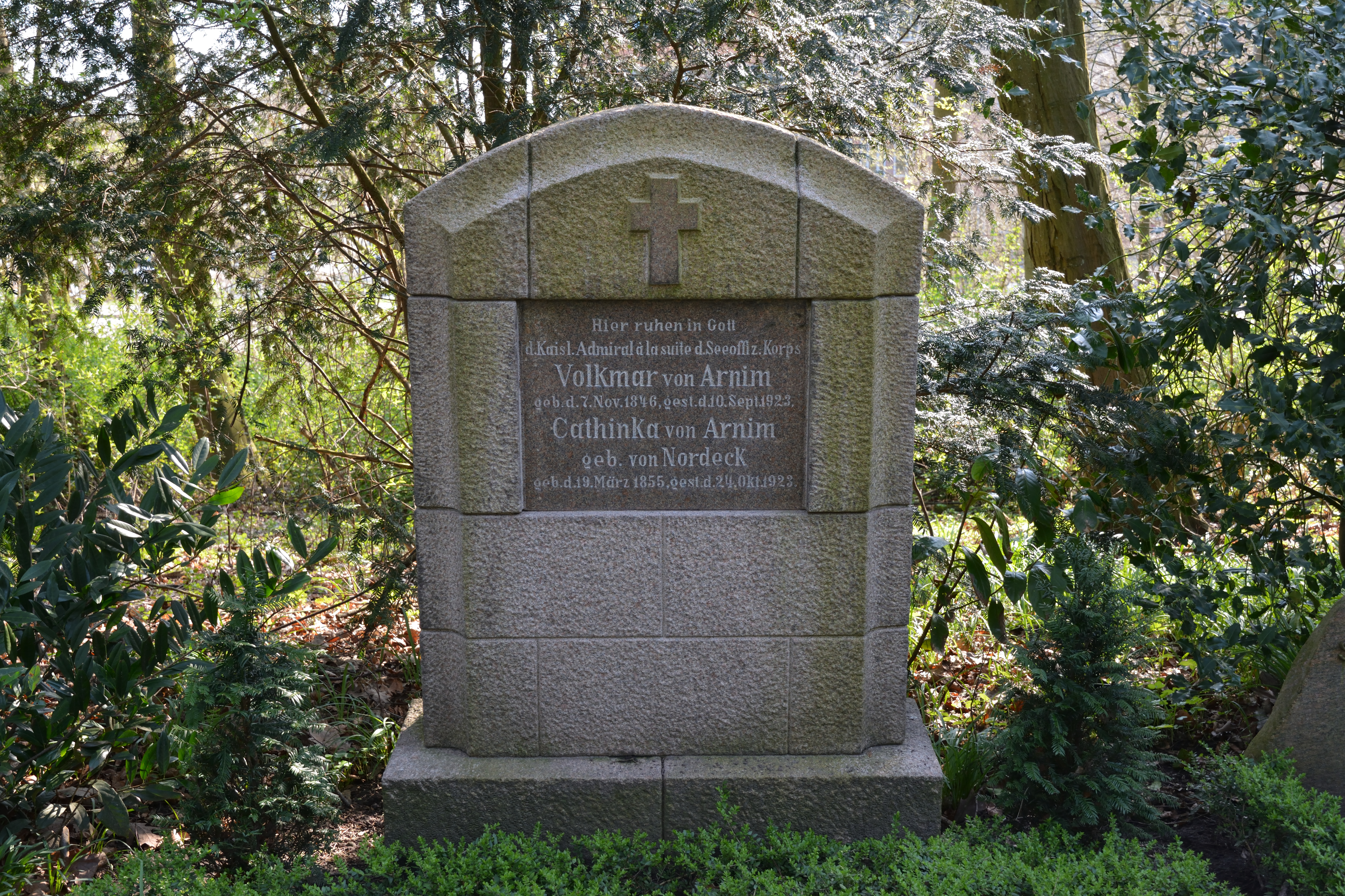 Impressionen vom Nordfriedhof in Kiel: Grab von Volkmar von Arnim